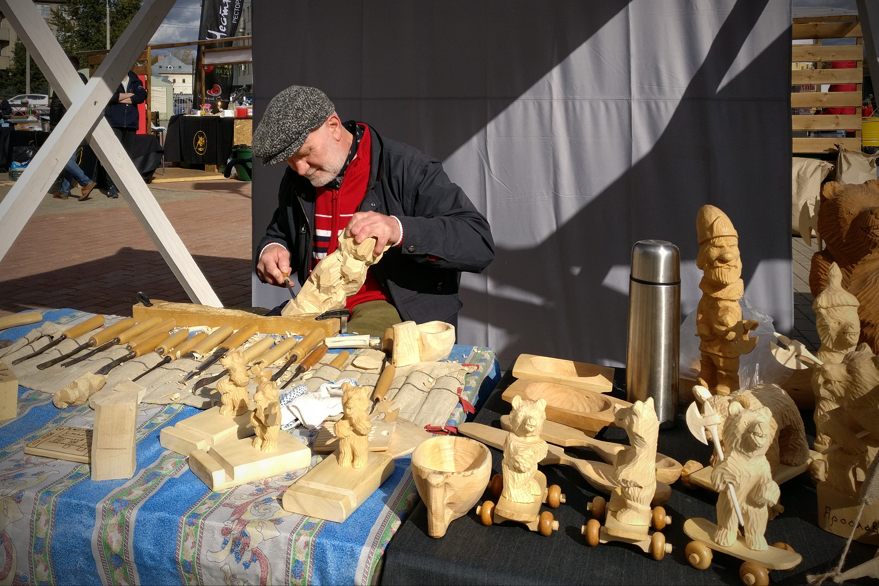 This image has been uploaded for Wikivoyage travel guide on Ярославская область